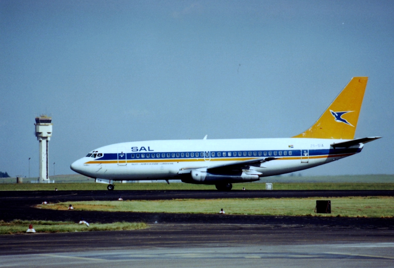 SAA B737-244 ZS-SIA